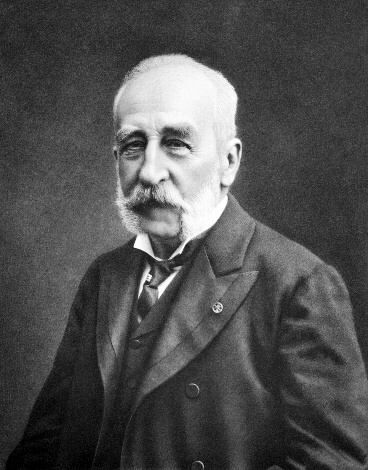 Karl Reissig, rakouský advokát a politik německé národnosti z Moravy